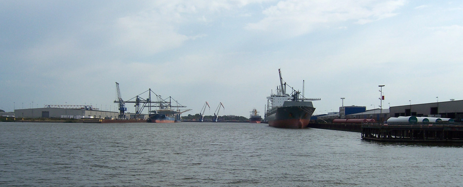 Einfahrt zum Neustädter Hafen in Bremen